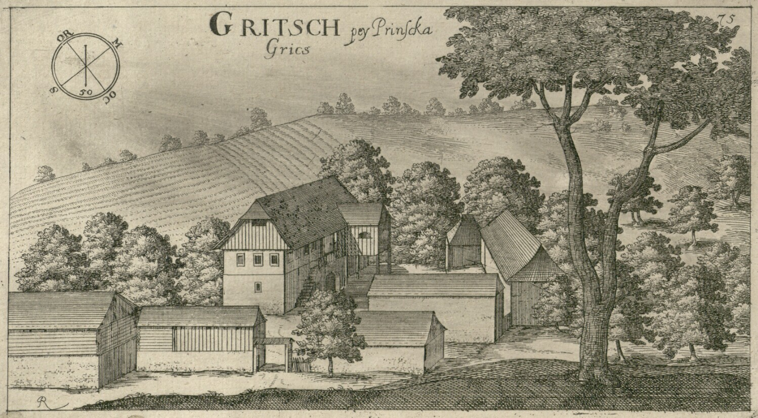 Gradič Grič (Gritsch)